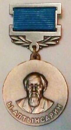 Нагрудный знак "Ибрай Алтынсарин"